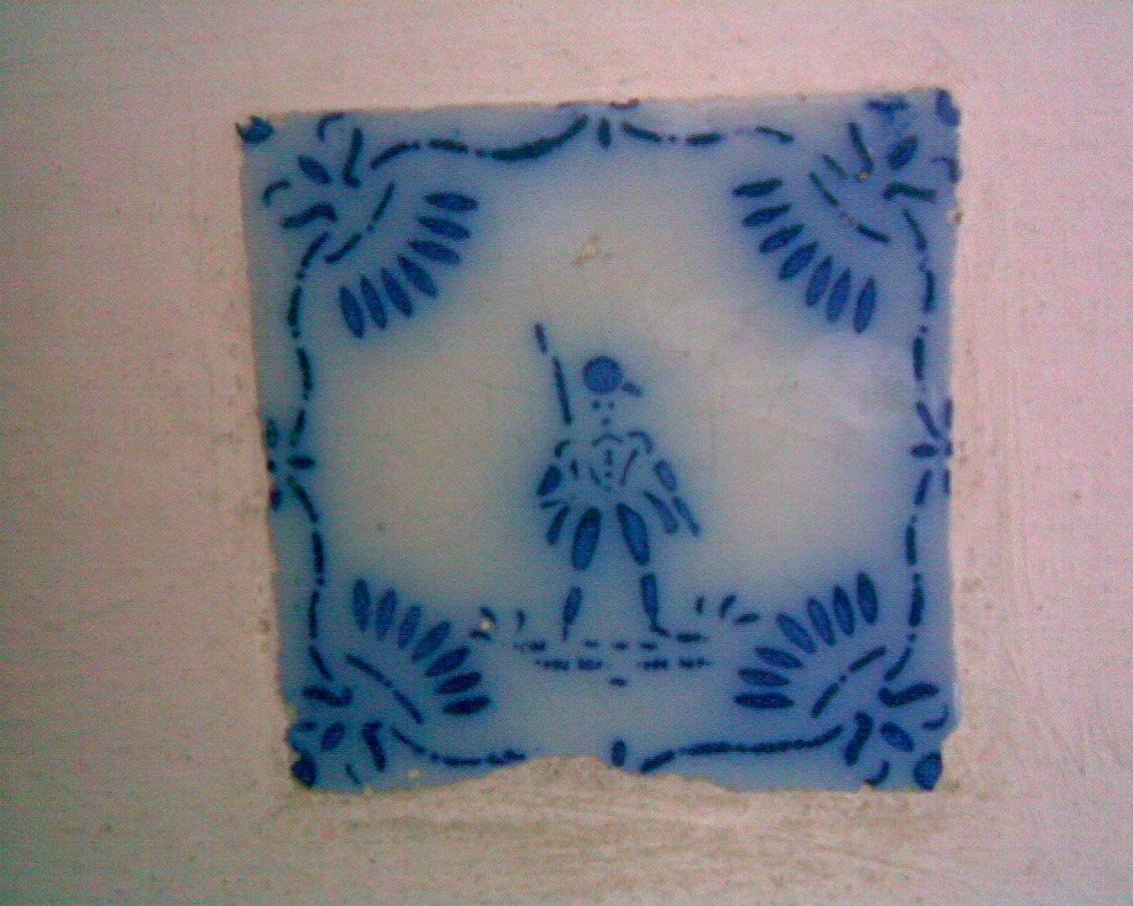 El hombrecito del azulejo, inspiración del cuento homónimo.